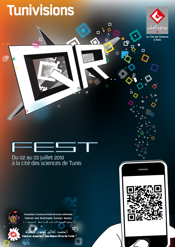 Affiche du QR Fest organisé par le magazine tunisien Tunivisions.